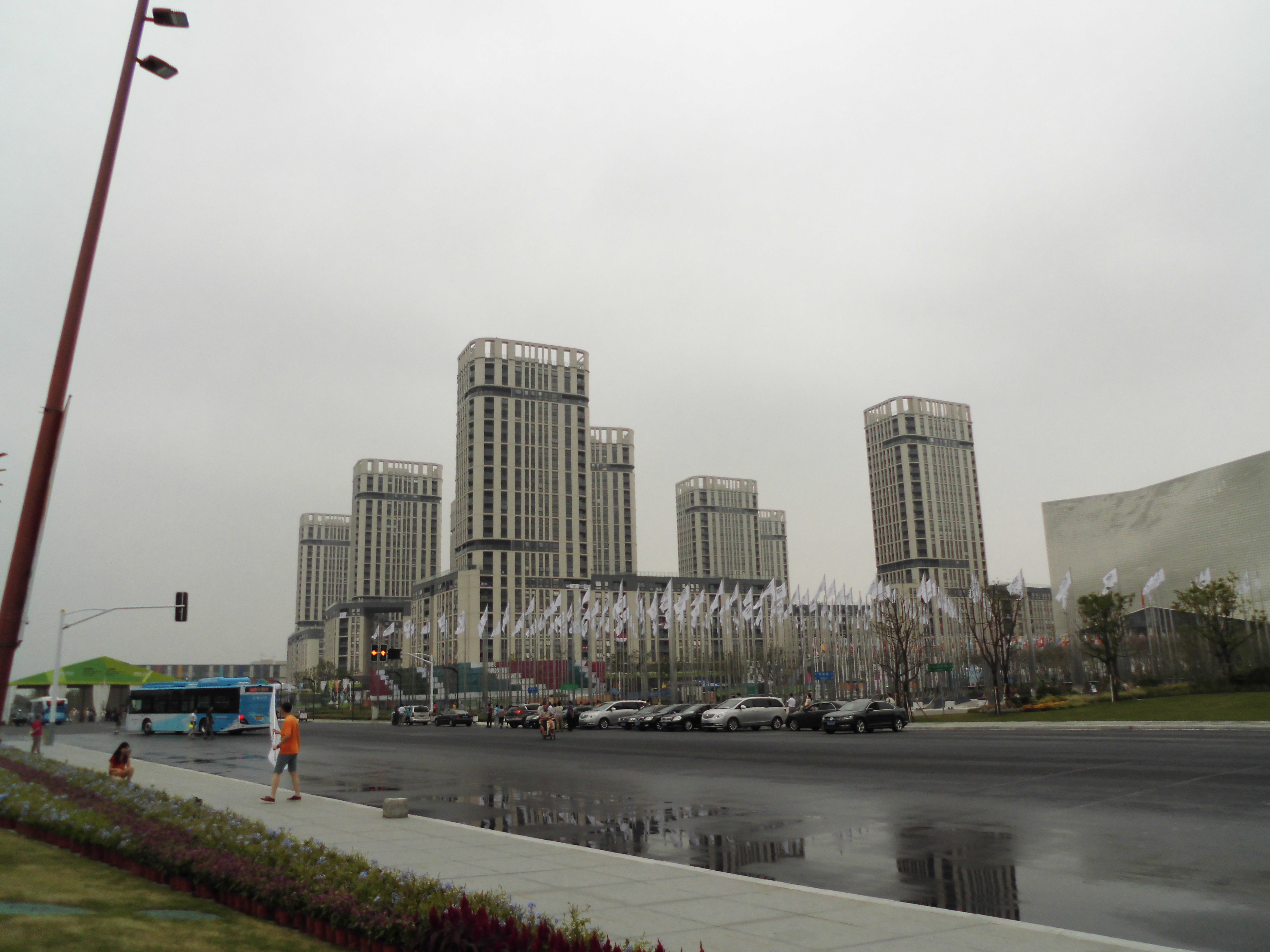 青奥村的建筑。